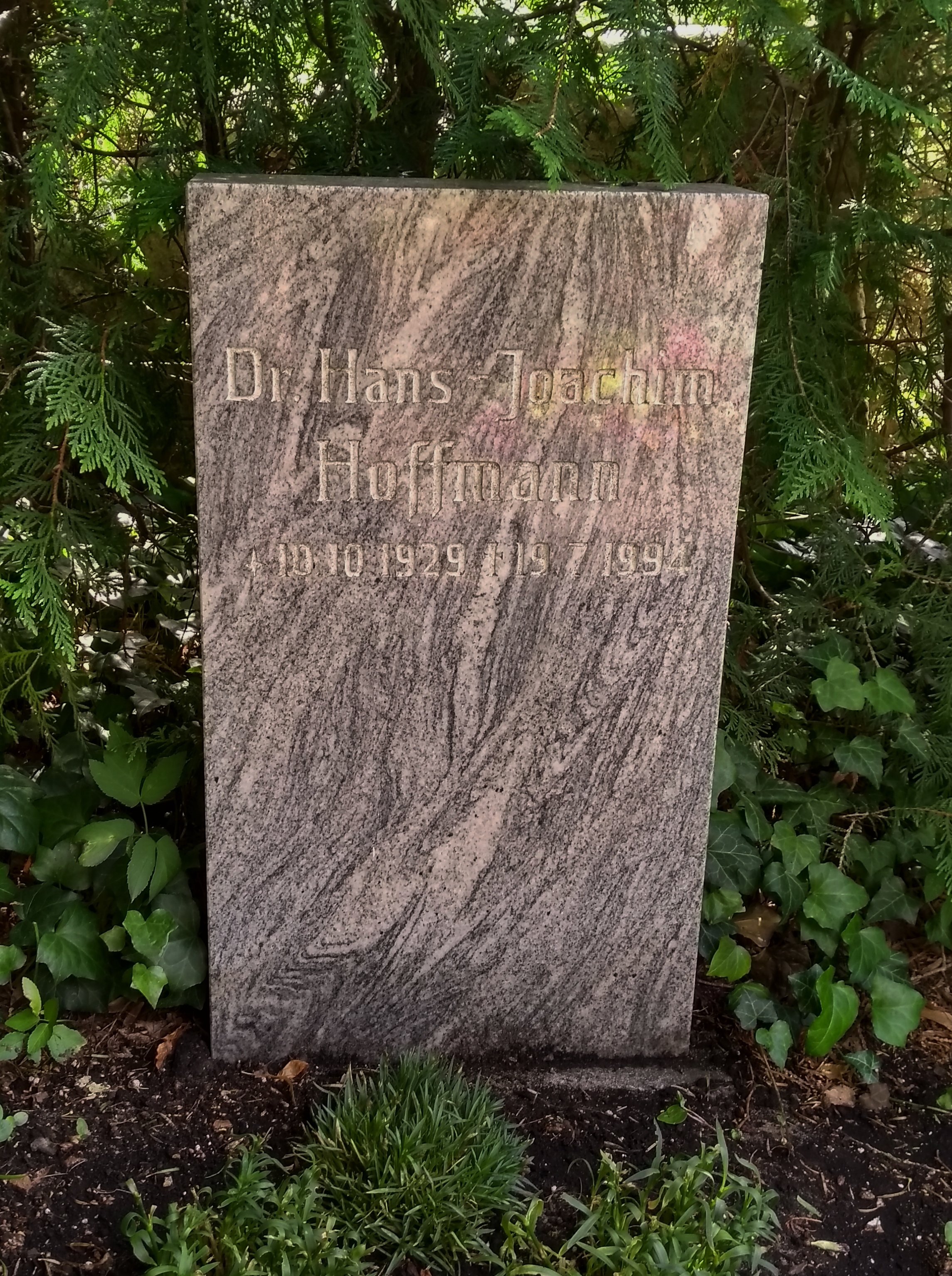 Grab Hans-Joachim Hoffmann